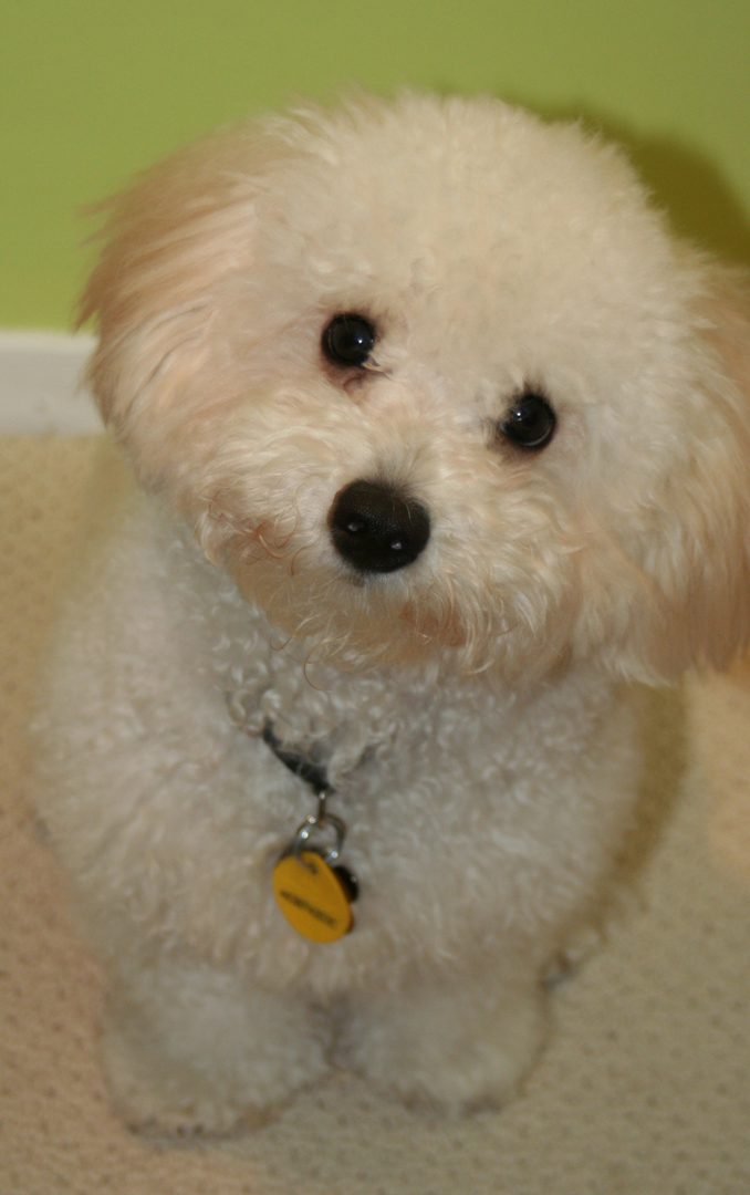 Bolgnese